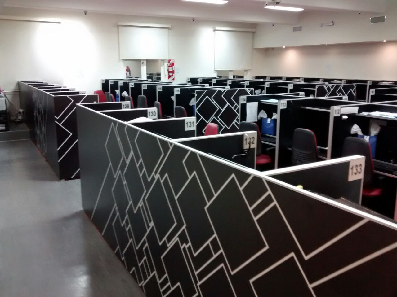 oficinas que implementan el método